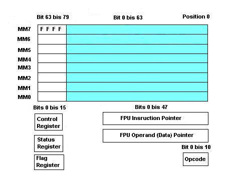 MMX Registers in the FPU